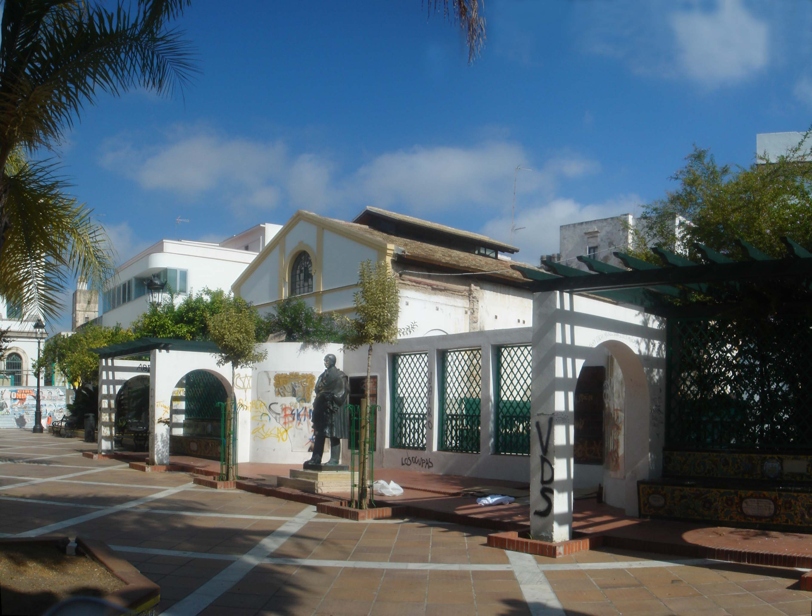 Monumento a Don Pedro Muñoz Seca en la Plaza de Isaac Peral, en El Puerto de Santa María. Como se puede observar en la foto el estado del mismo es lamentable, debido al vandalismo de individuos incivilizados.